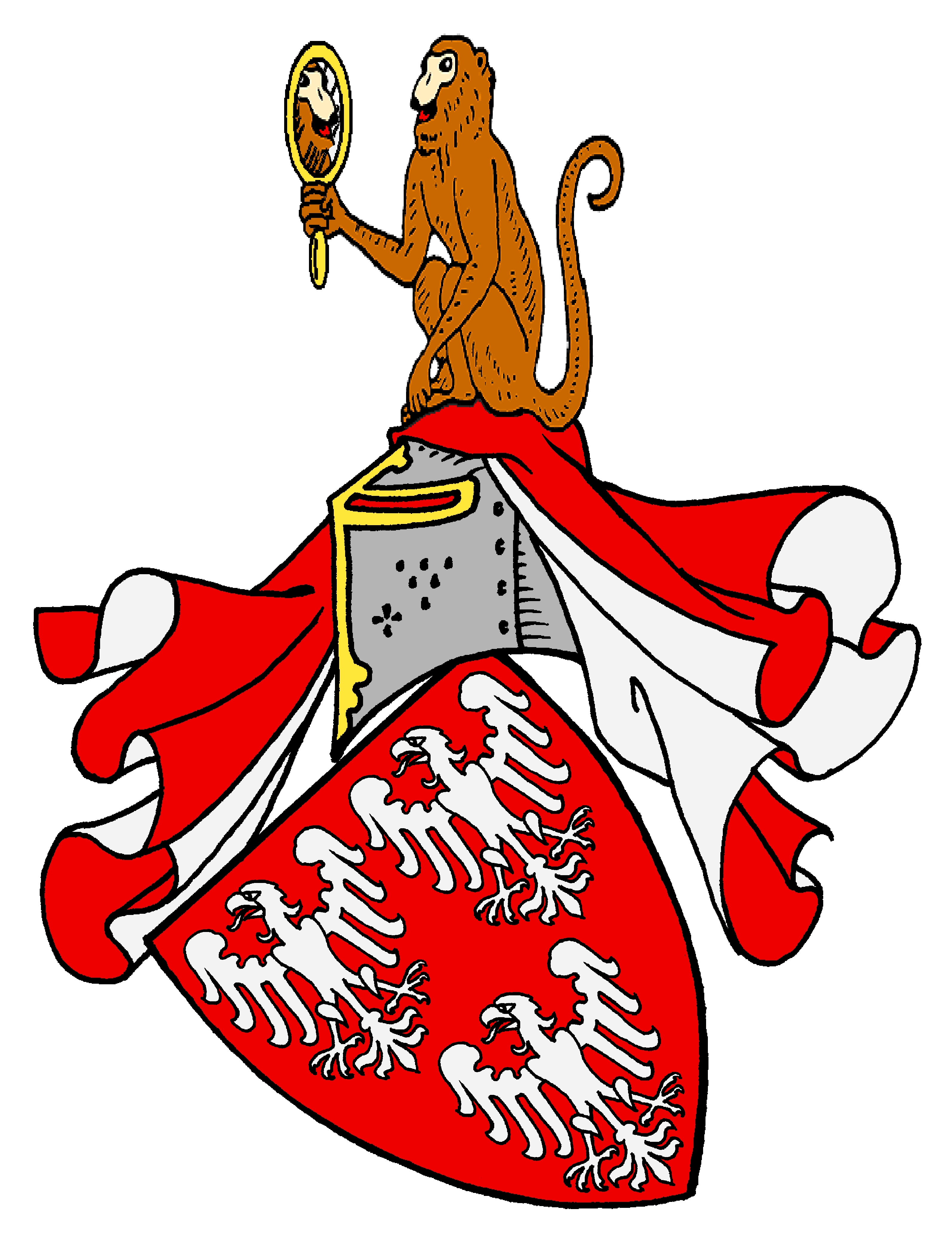 Stammwappen der von Dahn auch Tan, Tann oder Thann, ist der Name eines pfälzischen Adelsgeschlechts, das Ende des 12. Jahrhunderts mehrfach als Reichsministeriale auftrat, dann aber immer öfter als Ministeriale des Bischofs von Speyer fungierte.